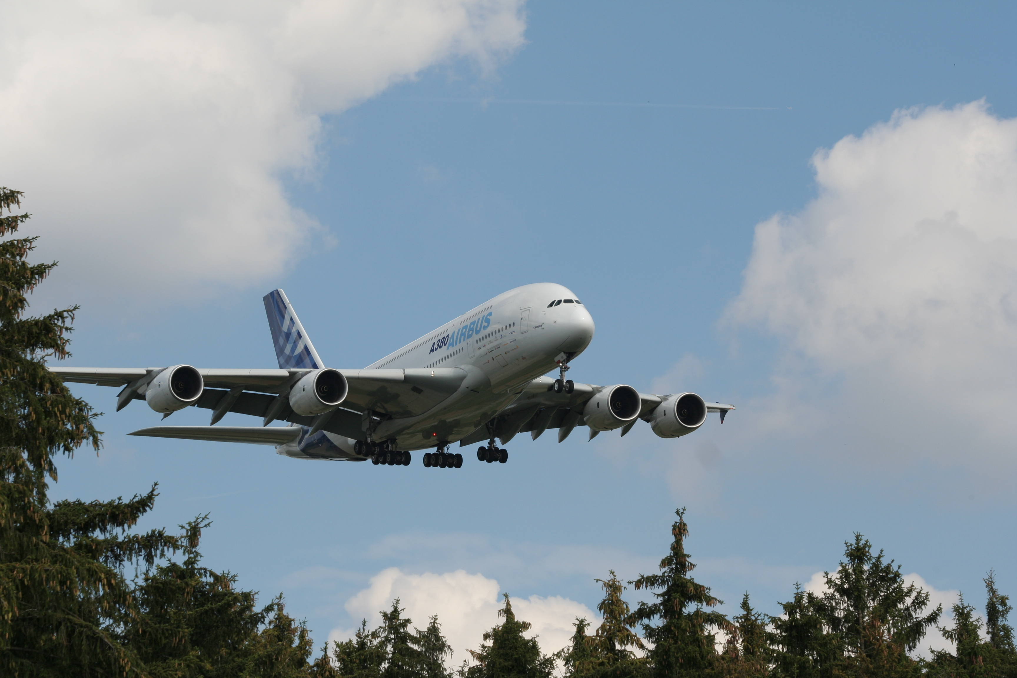 A 380 bei Wirbelschleppentests im Anflug auf den Sonderflughafen Oberpfaffenhofen